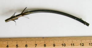 Stent aus Kunststoff